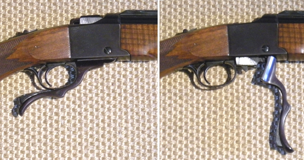 Sturm Ruger Fallblock